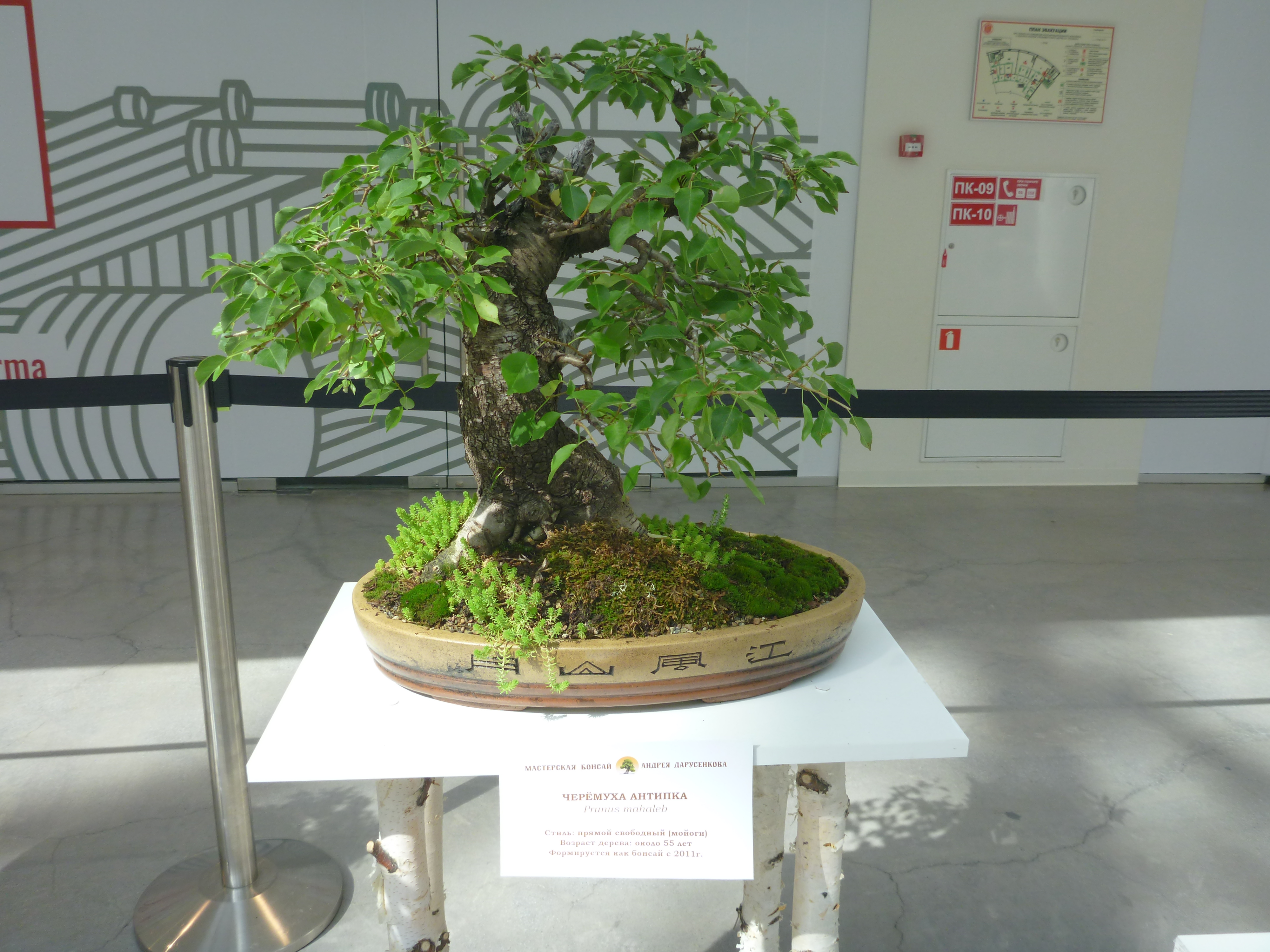 Черемуха Антипка бонсай в Ельцин-центре 2019 году